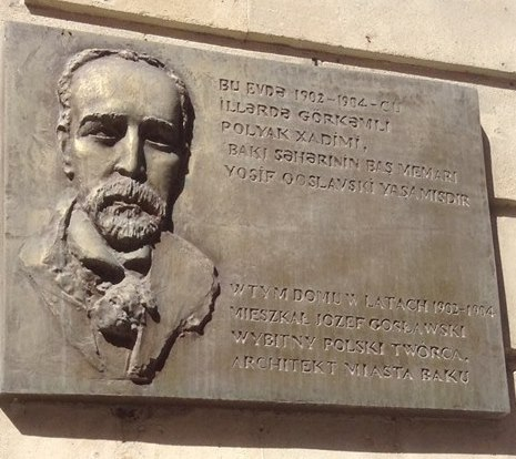 Xatirə lövhəsi